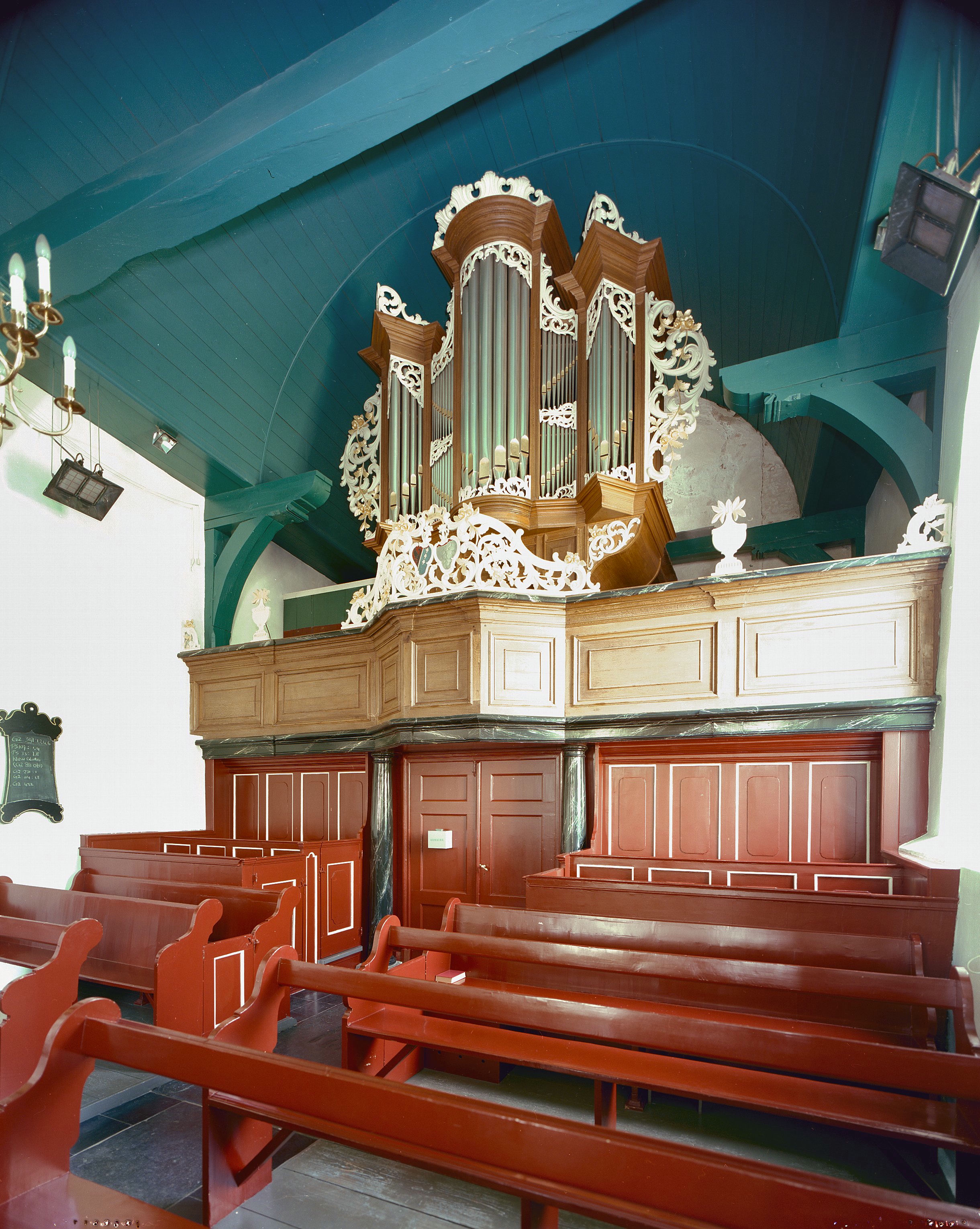 Hervormde kerk van Dantumawoude: Interieur, aanzicht orgel (opmerking: Gefotografeerd voor Het Historische Orgel in Nederland 1769-1790, bladzijde 149)